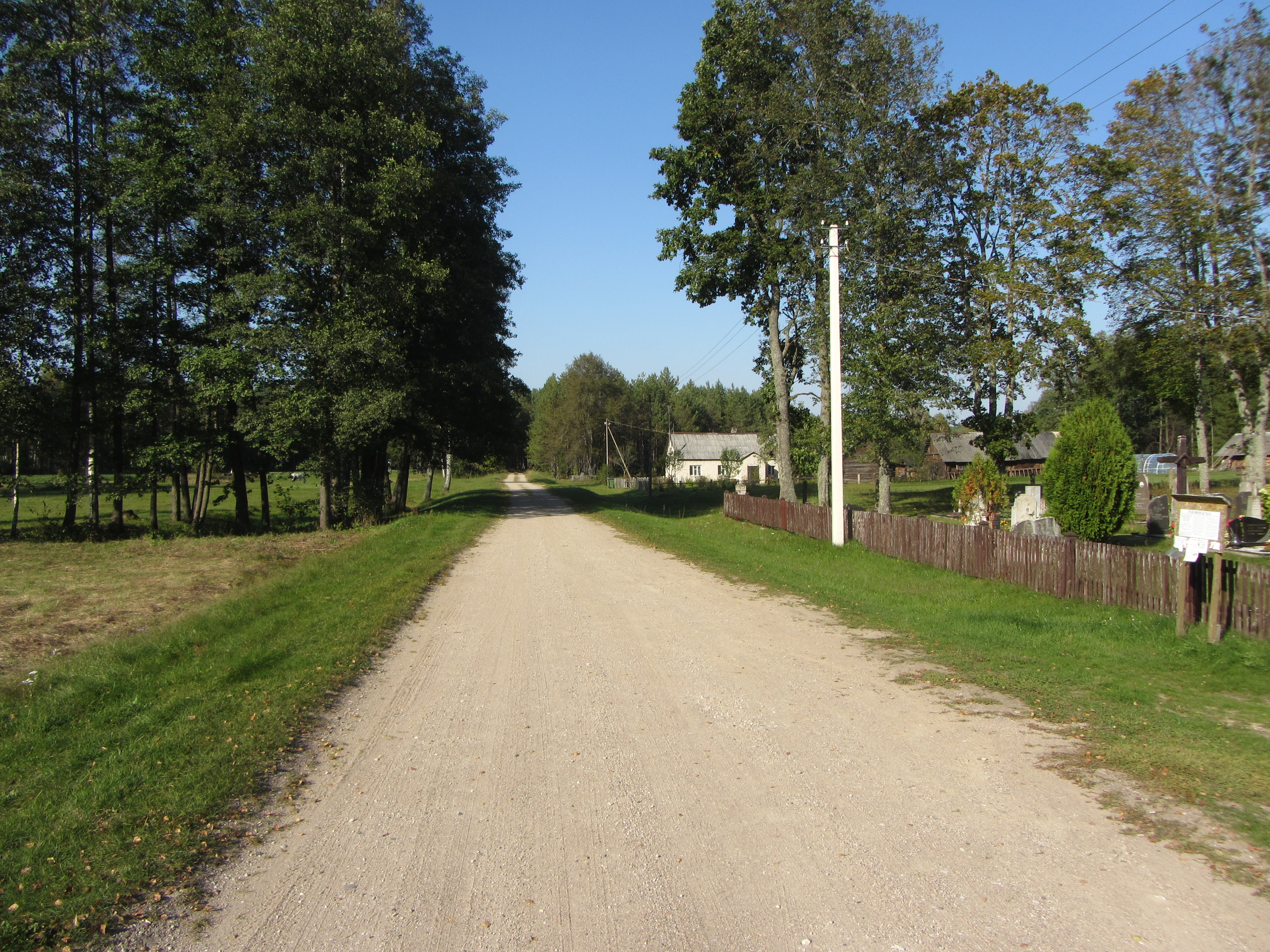 Jakėnų sen., Lithuania